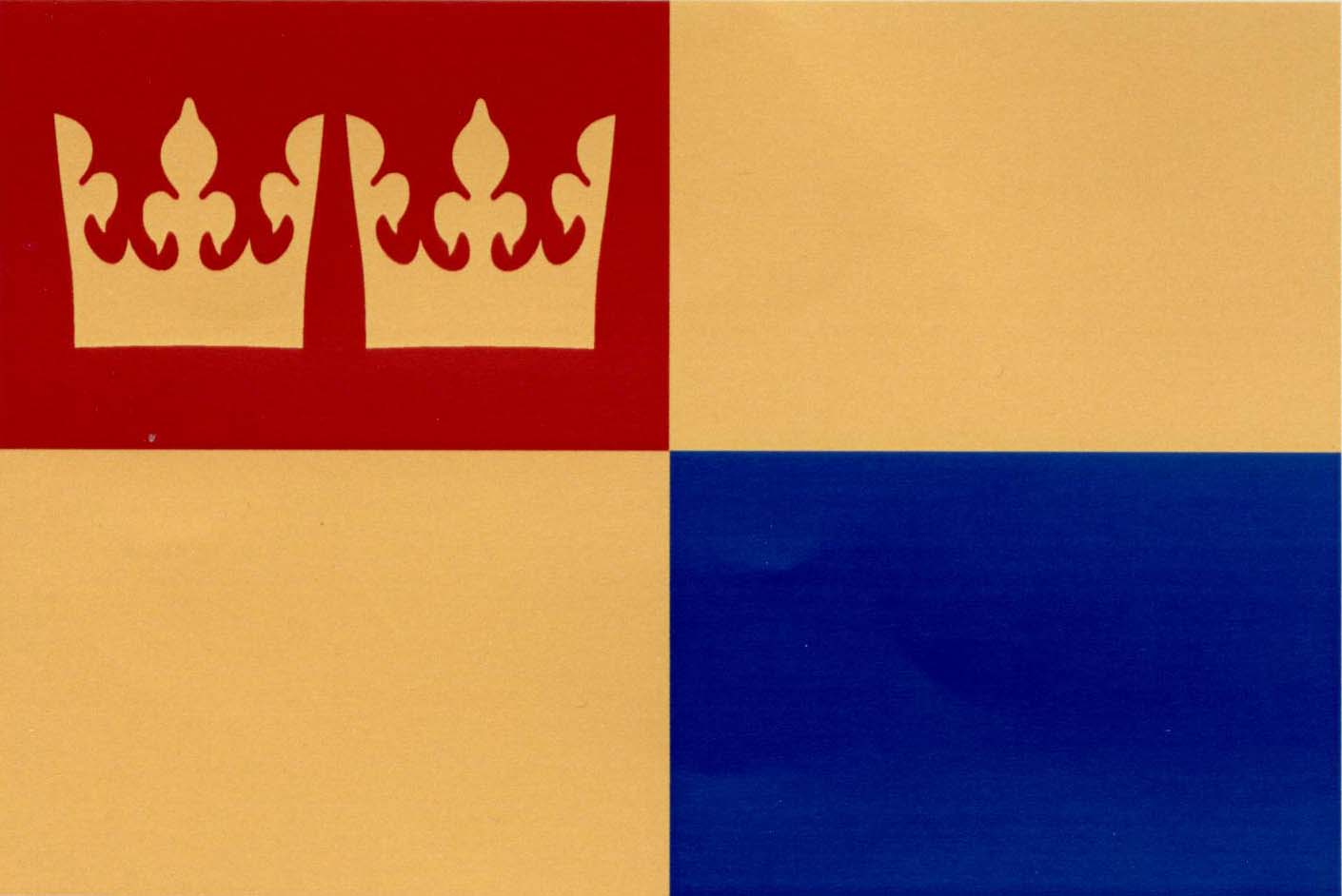 Vlajka obce Kraborovice